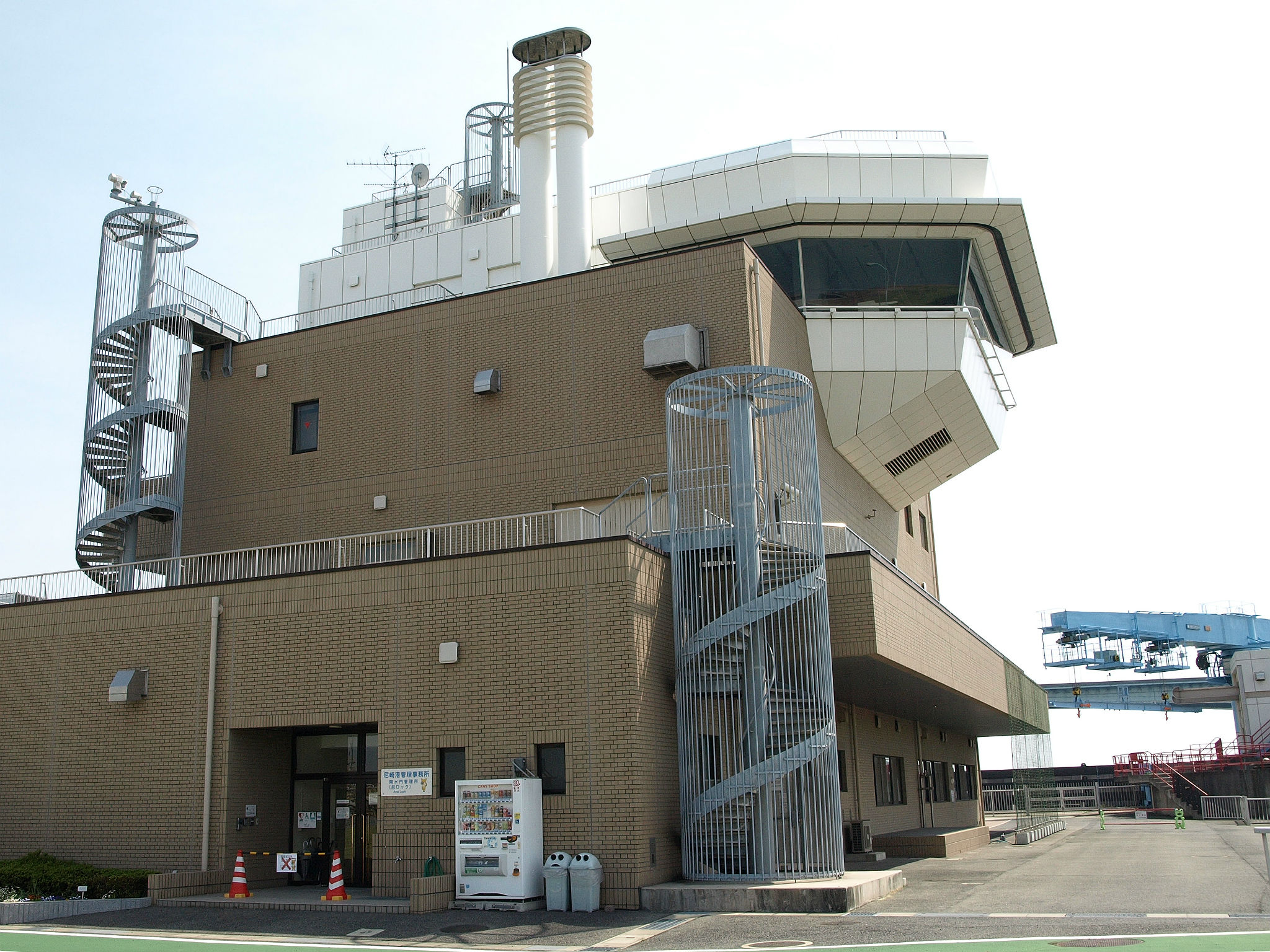 尼崎閘門 集中コントロールセンター ※2016.5.14 防災展示室・一般開放日に撮影